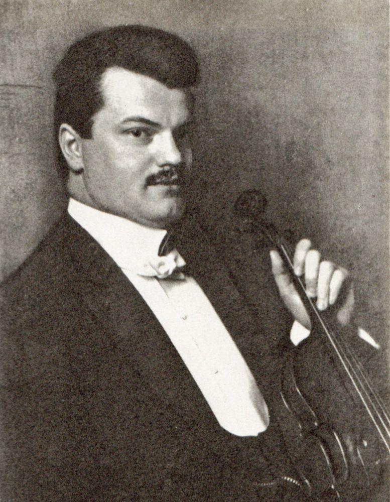 Edgar Wollgandt um 1905, Konzertmeister des Gewandhausorchesters